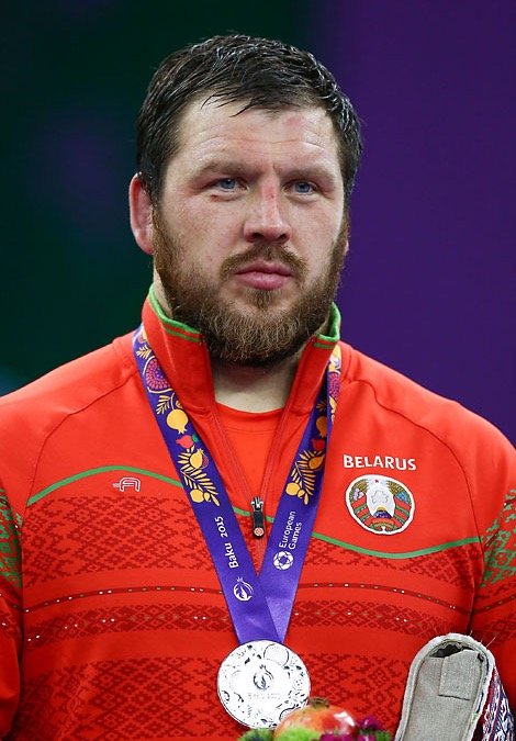 Wrestling